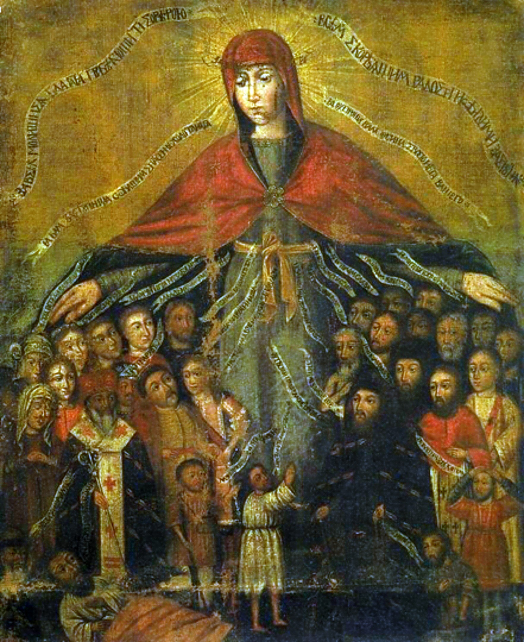 Малороссийская икона "Покрова Пресвятой богородицы" начала XVII века с изображением казаков.